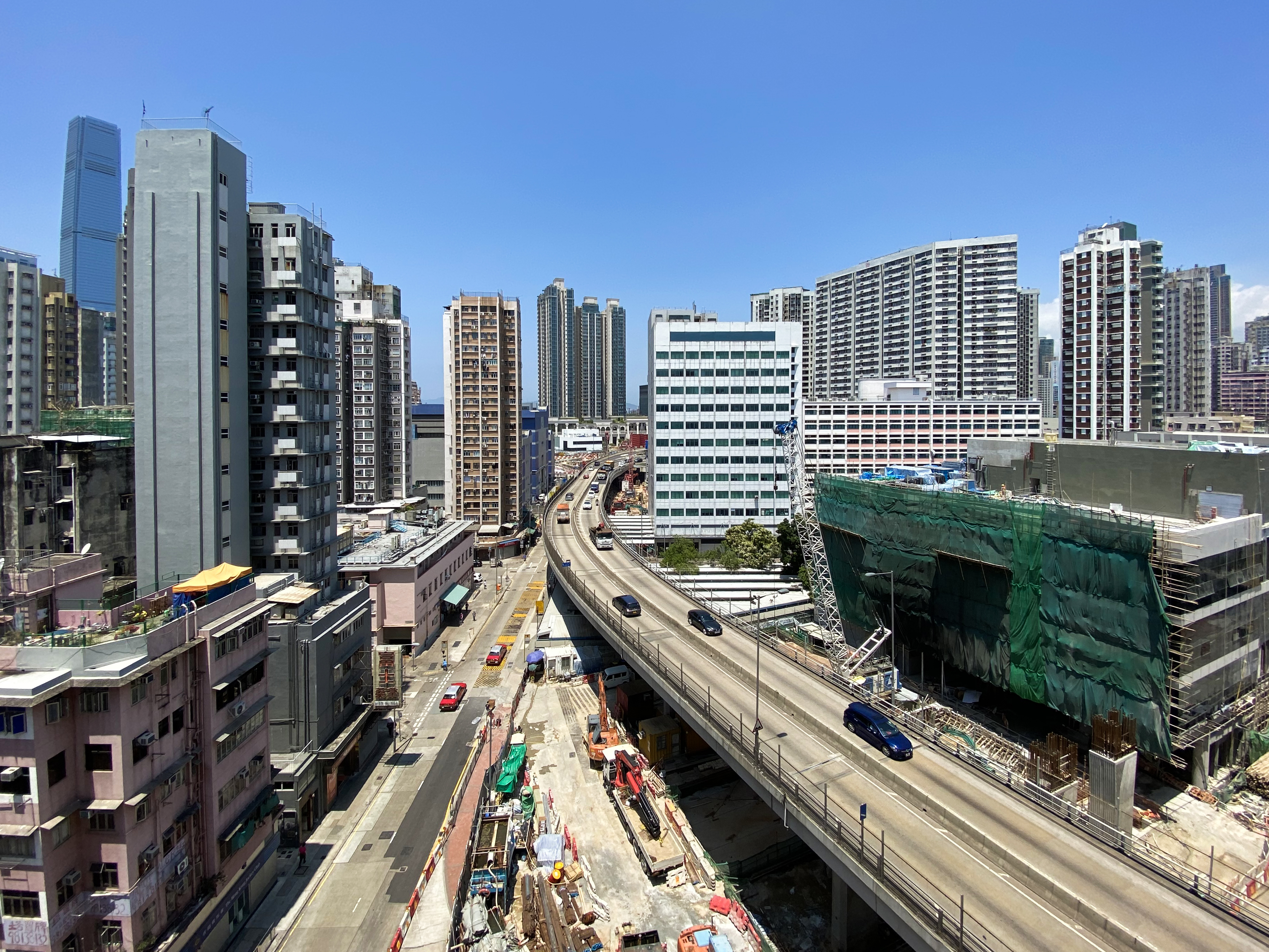 West Kowloon Corridor